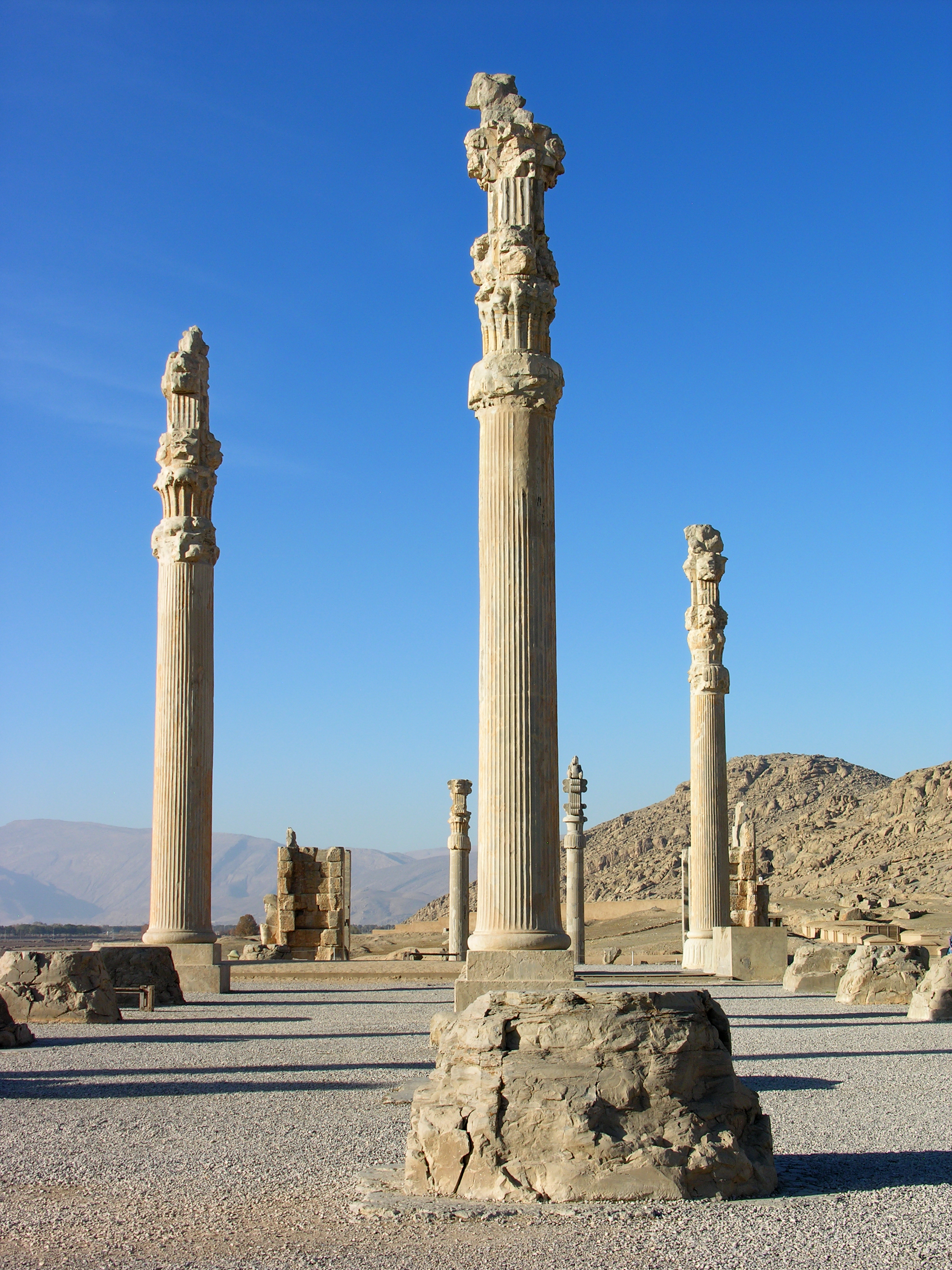 Iran, Apadana